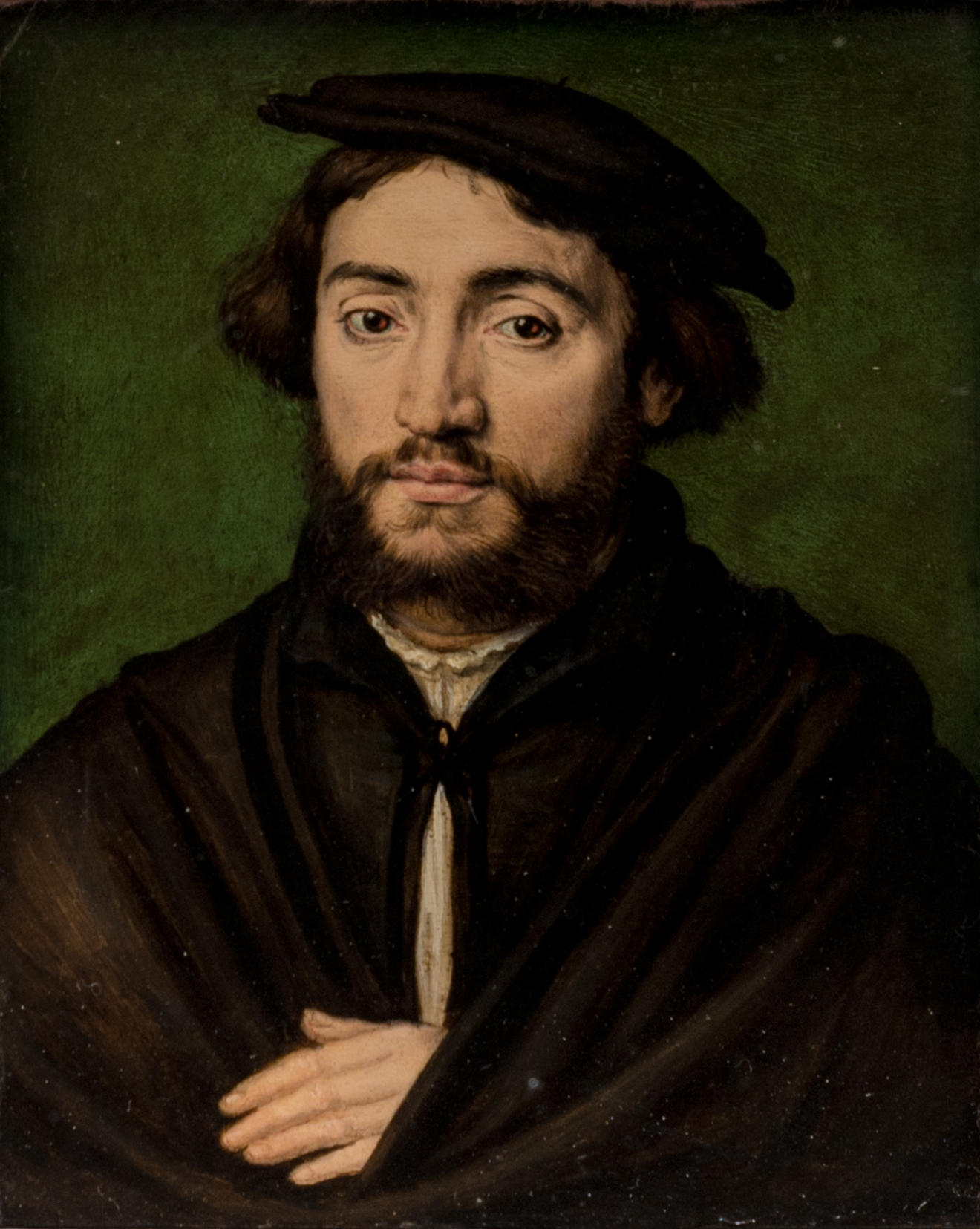 Corneille de Lyon (vers 1500-1510 – 1575), Pierre Aymeric. 1534. Huile sur bois (noyer). Paris, musée du Louvre.